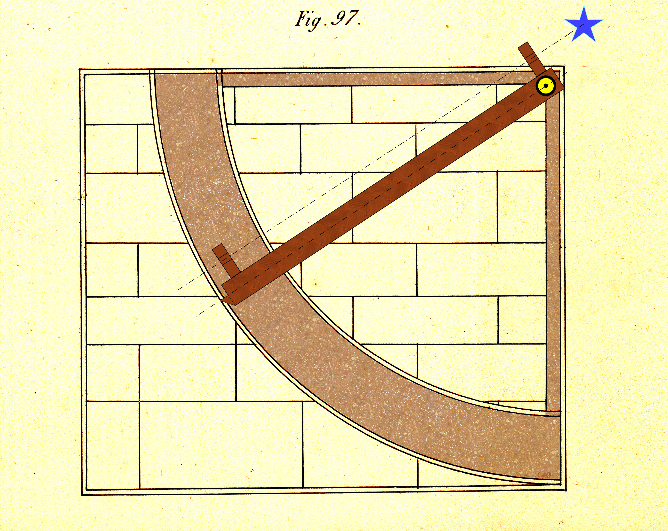 Schéma d'un quadrant mural à alidade